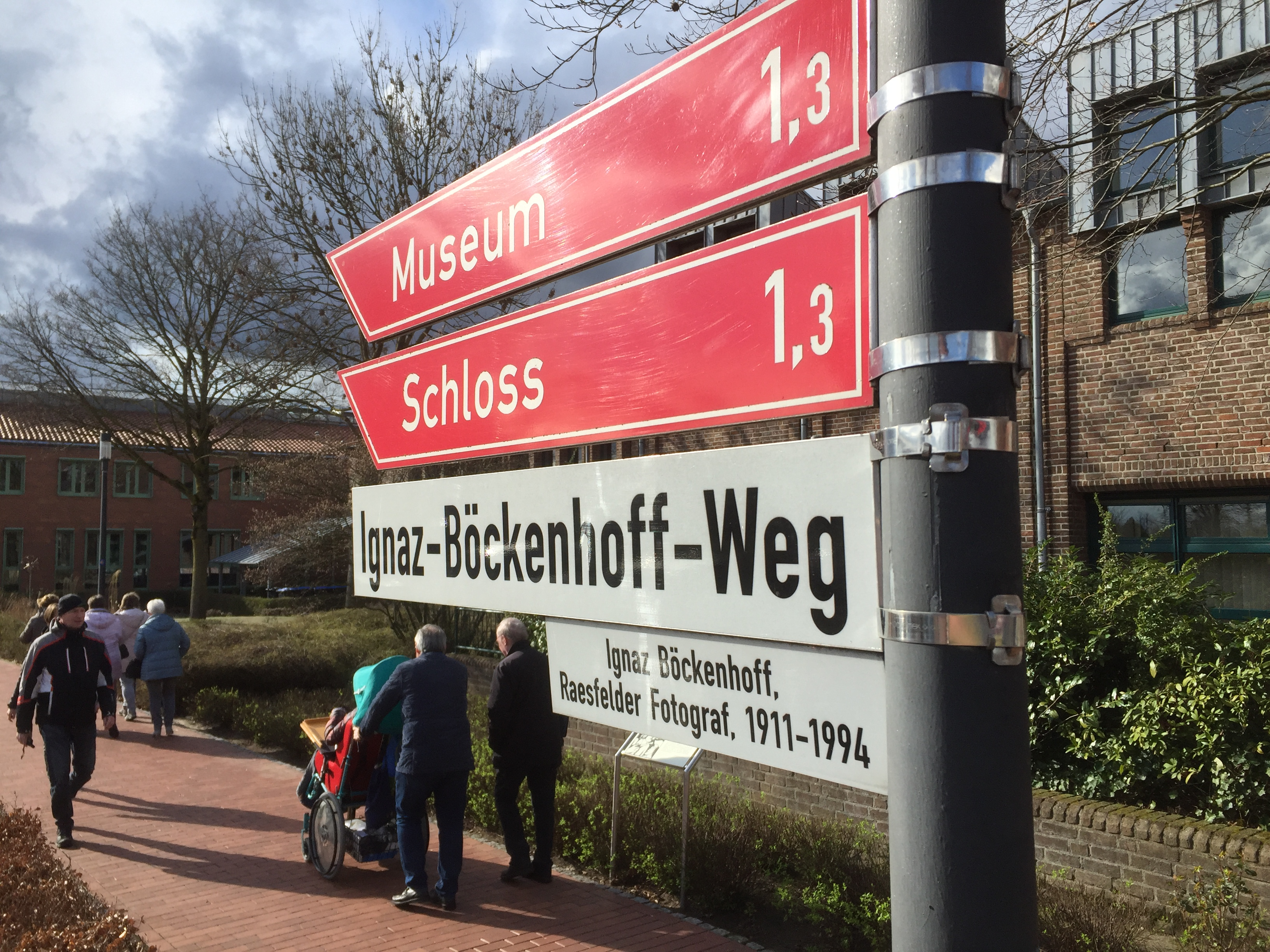 Straßenschild des Ignaz-Böckenhoff-Weges in Raesfeld